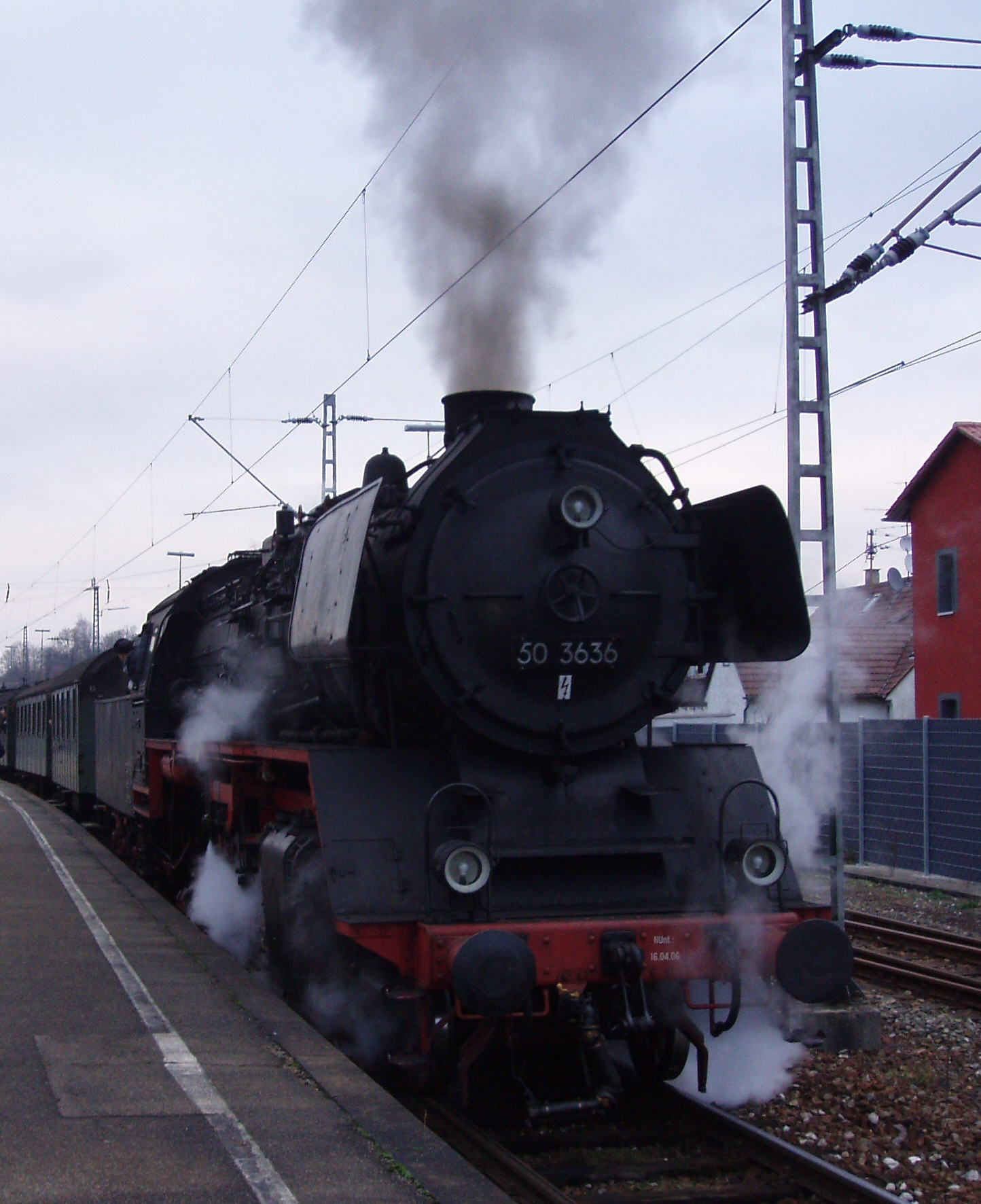 Sofazügle 50 3636 in Nürtingen